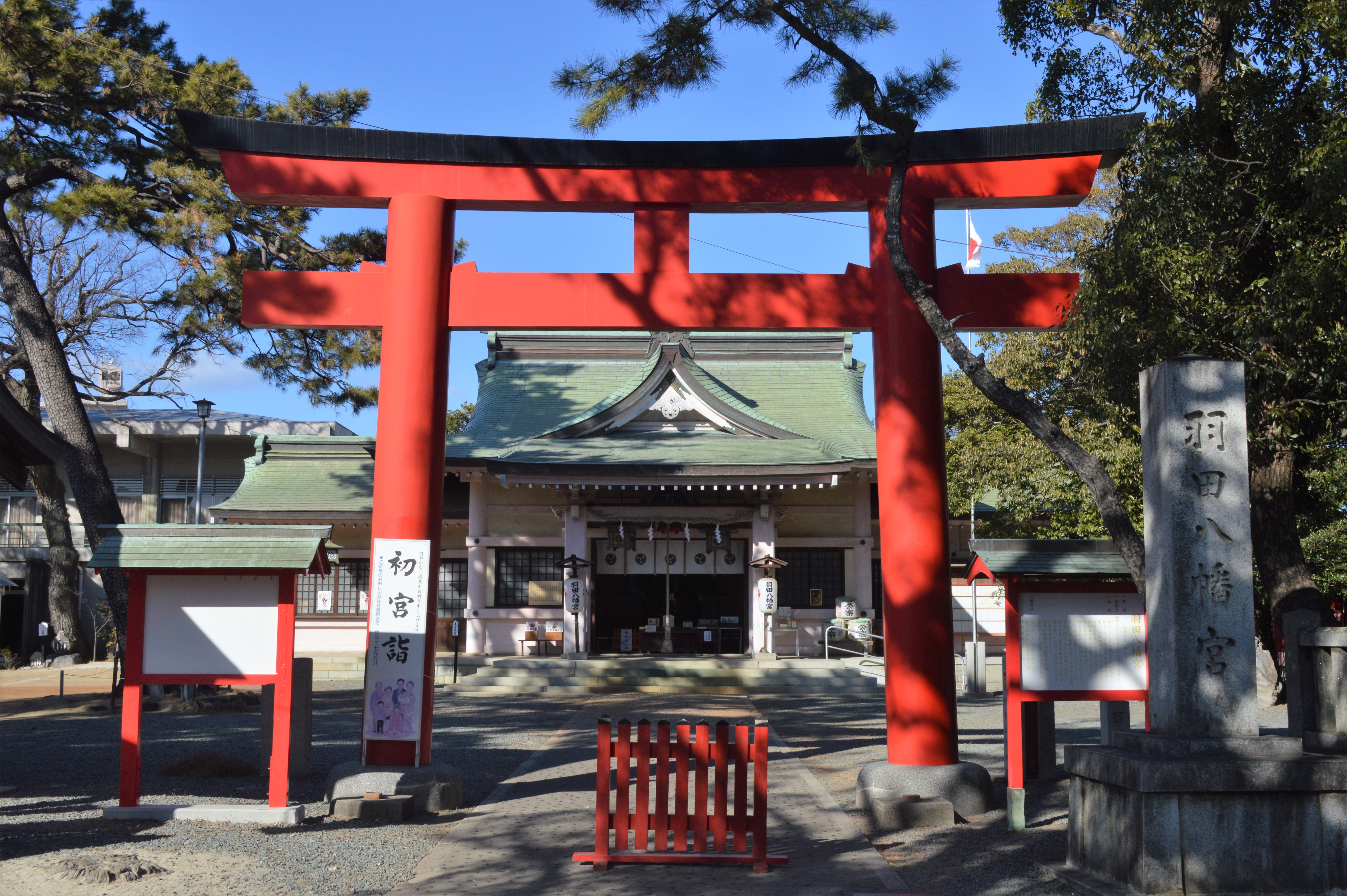 愛知県豊橋市にある羽田八幡宮。